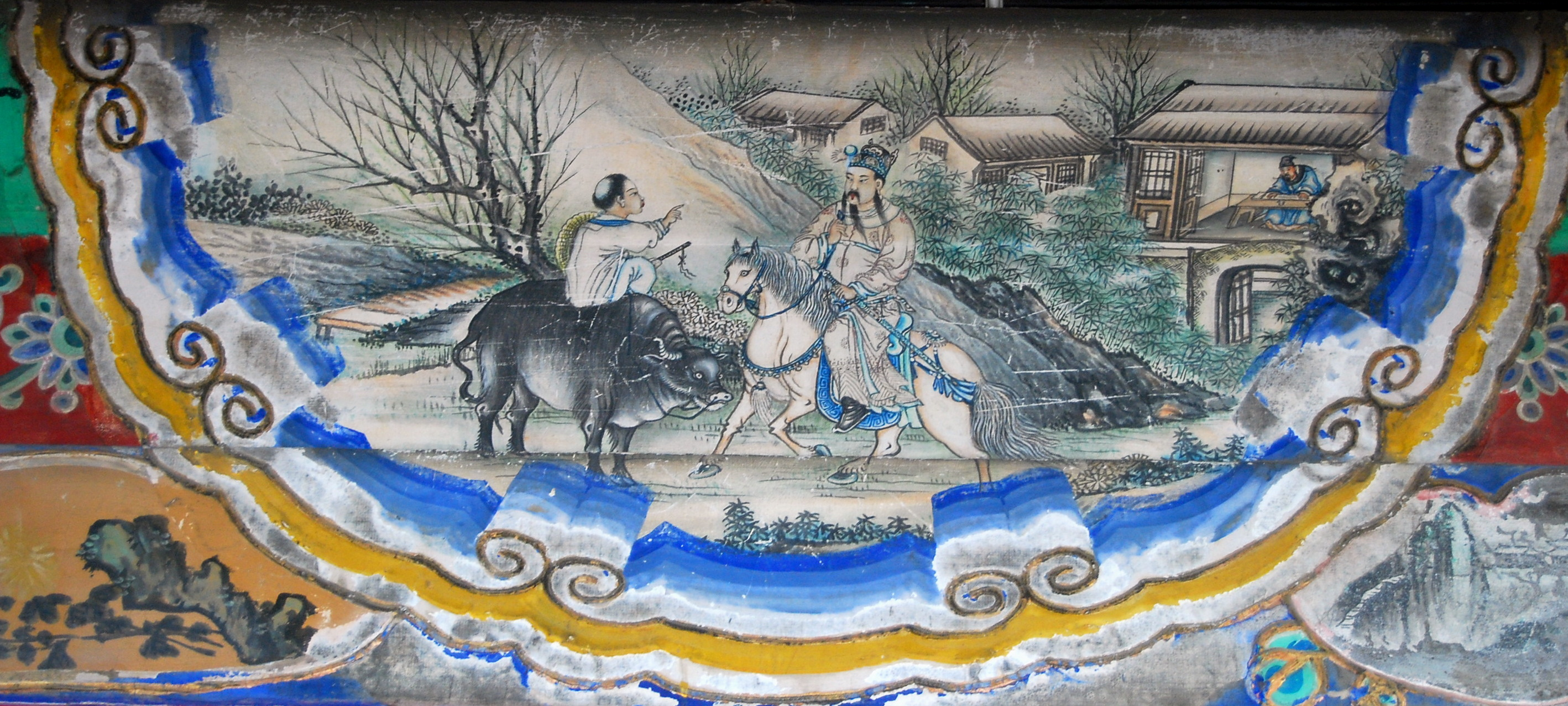 颐和园长廊上的彩绘：刘备路访水镜